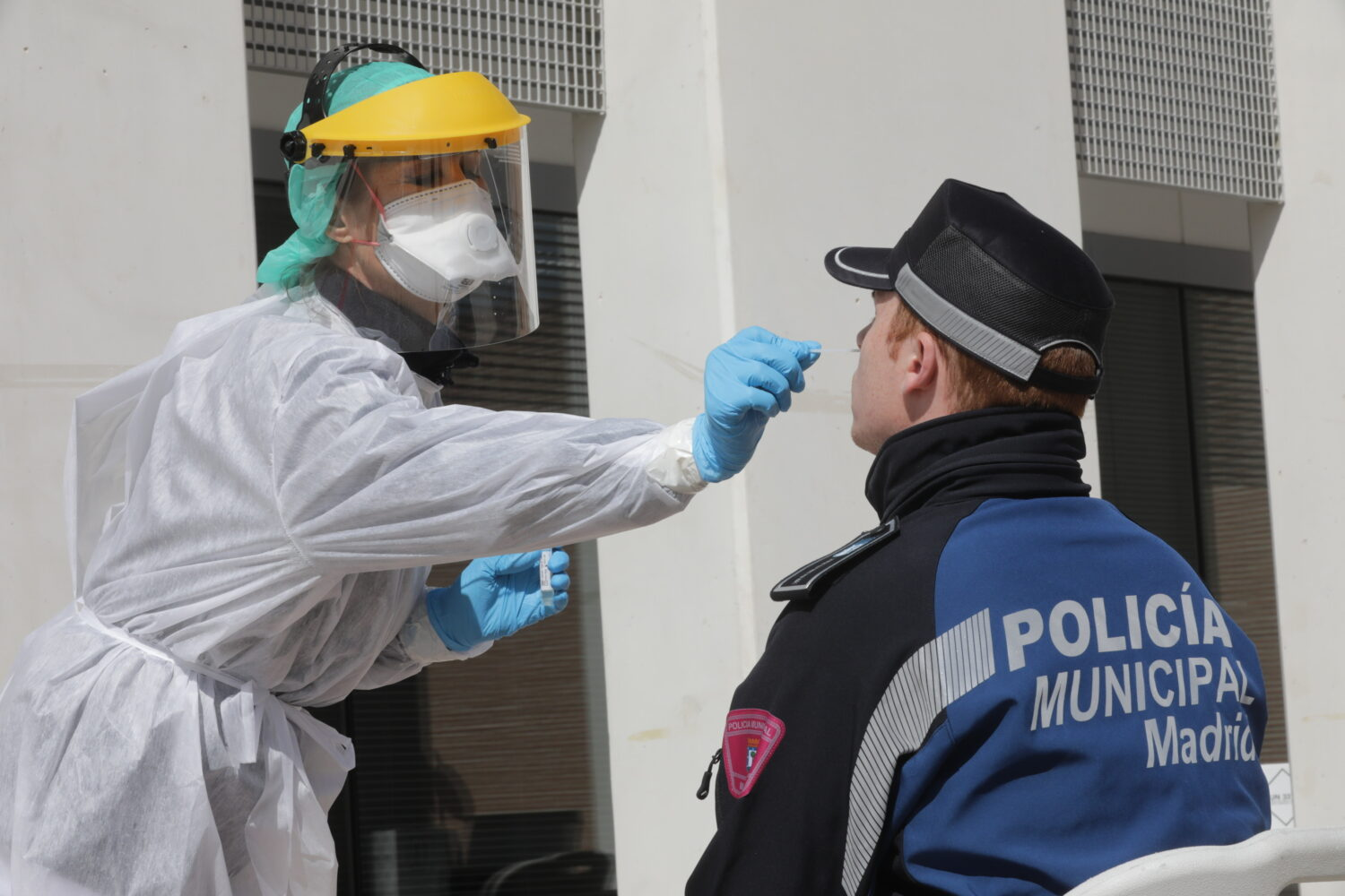 El Ayuntamiento hace desde hoy pruebas diagnósticas del COVID-19 a los servicios esenciales municipales Los resultados se conocerán 48 horas después de tomar las muestras El organismo autónomo Madrid Salud, dependiente del Área de Portavoz, Seguridad y Emergencias, se encarga de la realización de los tests 25/03/2020 El Ayuntamiento de Madrid ha comenzado esta mañana a hacer pruebas de COVID-19 a los servicios esenciales municipales como son Policía Municipal, SAMUR-Protección Civil, Bomberos y Samur Social, entre otros.